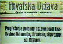 Novine "Hrvatska Država" objavljuju raskid svih veza Hrvatske i Austro-Ugarske